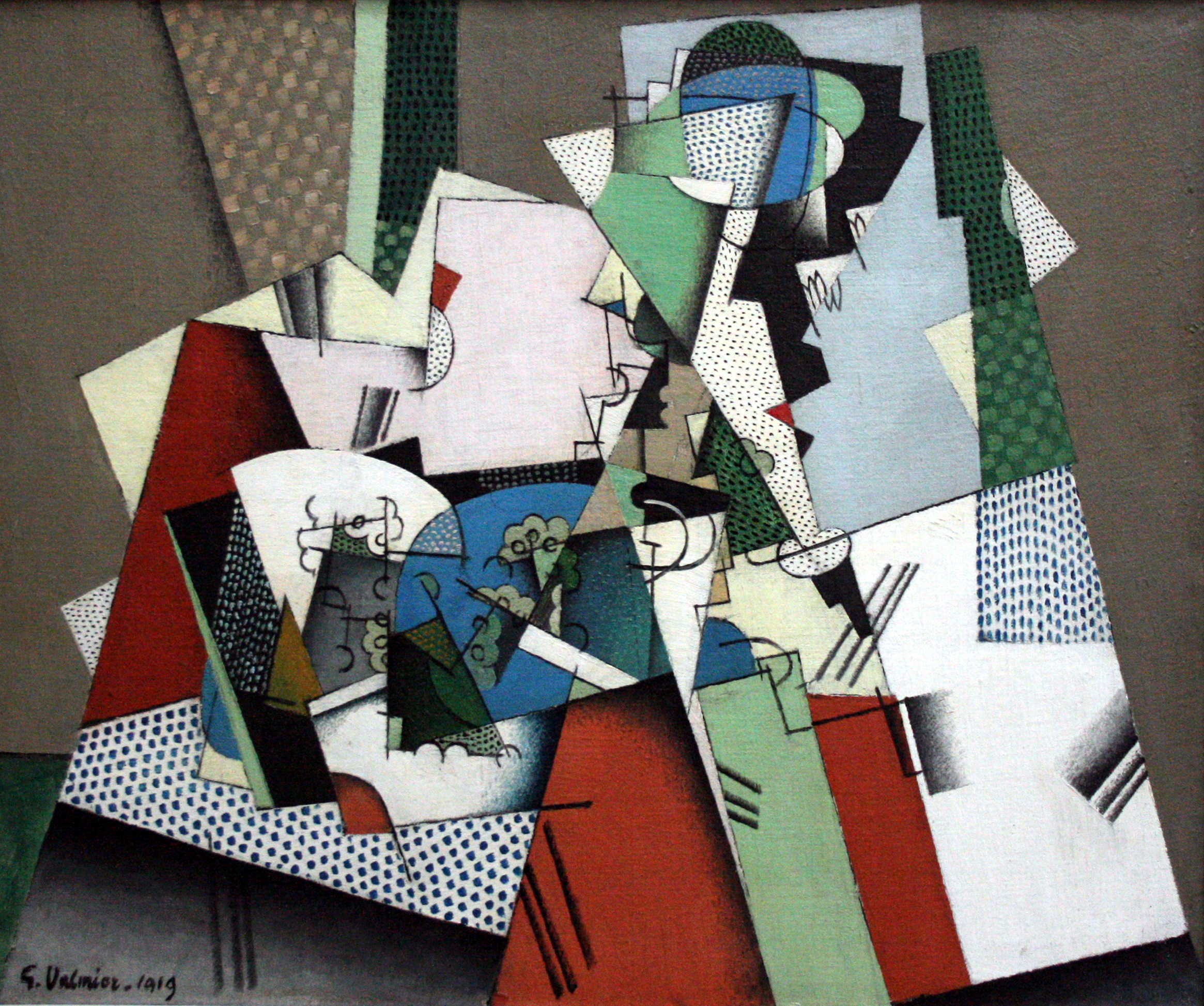 Geometrical still life